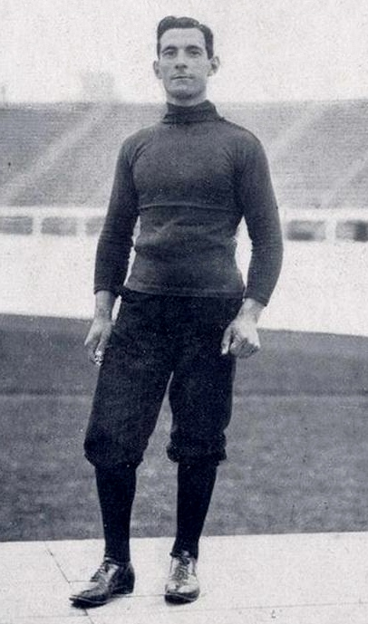 Il ginnasta italiano Alberto Braglia. Tratto da "Lo Sport Fascista" n.1, 1928